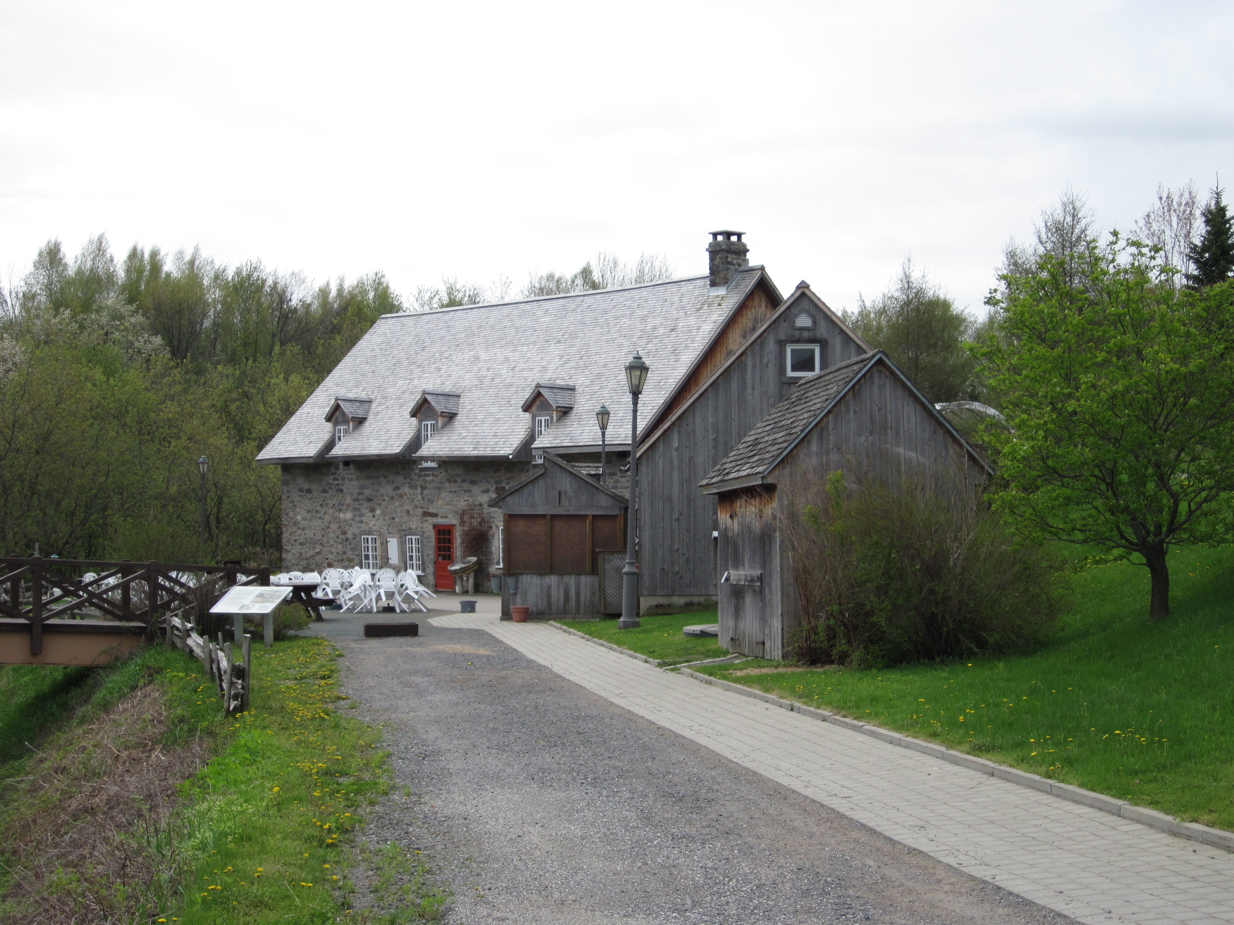 Moulin Michel à Gentilly, classé monument historique en 1985